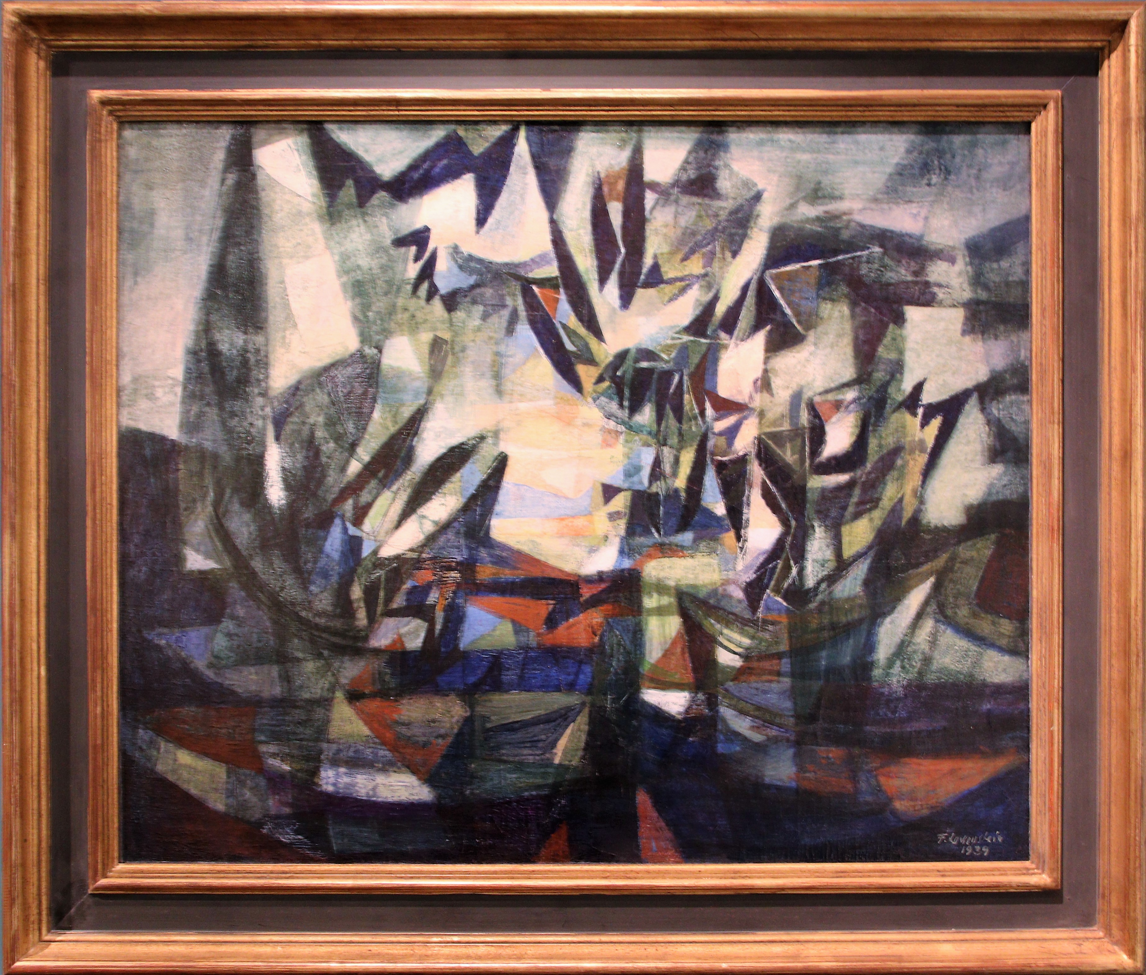 Composition, 1939, huile sur toile de Fédor Löwenstein (1901-1946). Une croix rouge sur le tableau (saisi en décembre 1942) indique qu'elle devait être détruite. En juillet 1943 Composition échappe à l'autodafé. Œuvre inscrite (indument) en 1973 sur l'inventaire des collections nationales, puis radiée, réinscrite en 2011 sur l'inventaire spécial provisoire des œuvres récupérées, déposée au Centre Pompidou. (inv. MNR R 28 P). Exposition temporaire "Rose Valland. En quête de l'art spolié" (novembre 2019 à avril 2020) au Musée dauphinois, Grenoble.